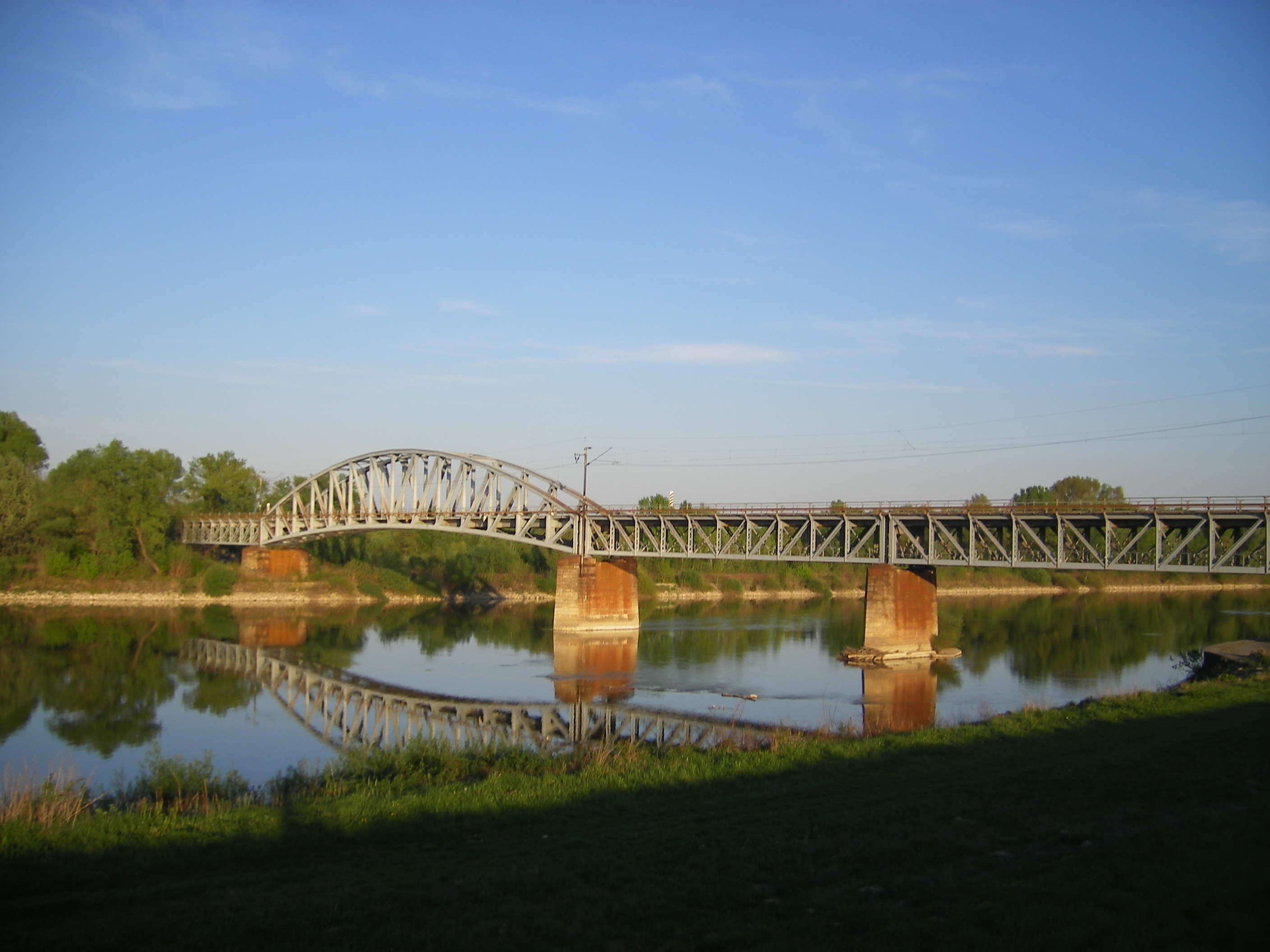 Železniční most přes Váh v Komárně